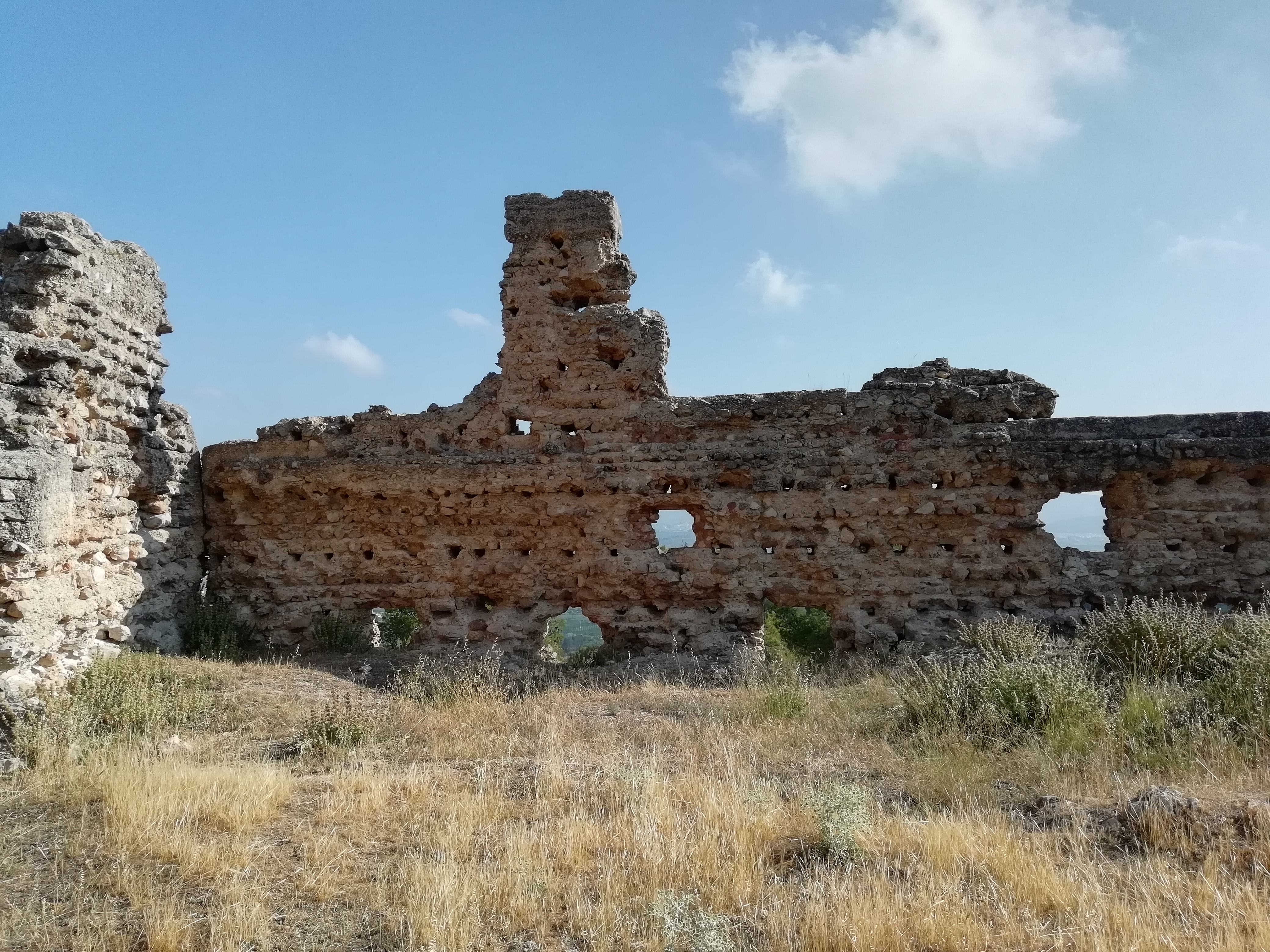 Lienzo de un gran edificio en el recinto superior del castillo de Enguera. Se aprecia la técnica constructiva del tapial.